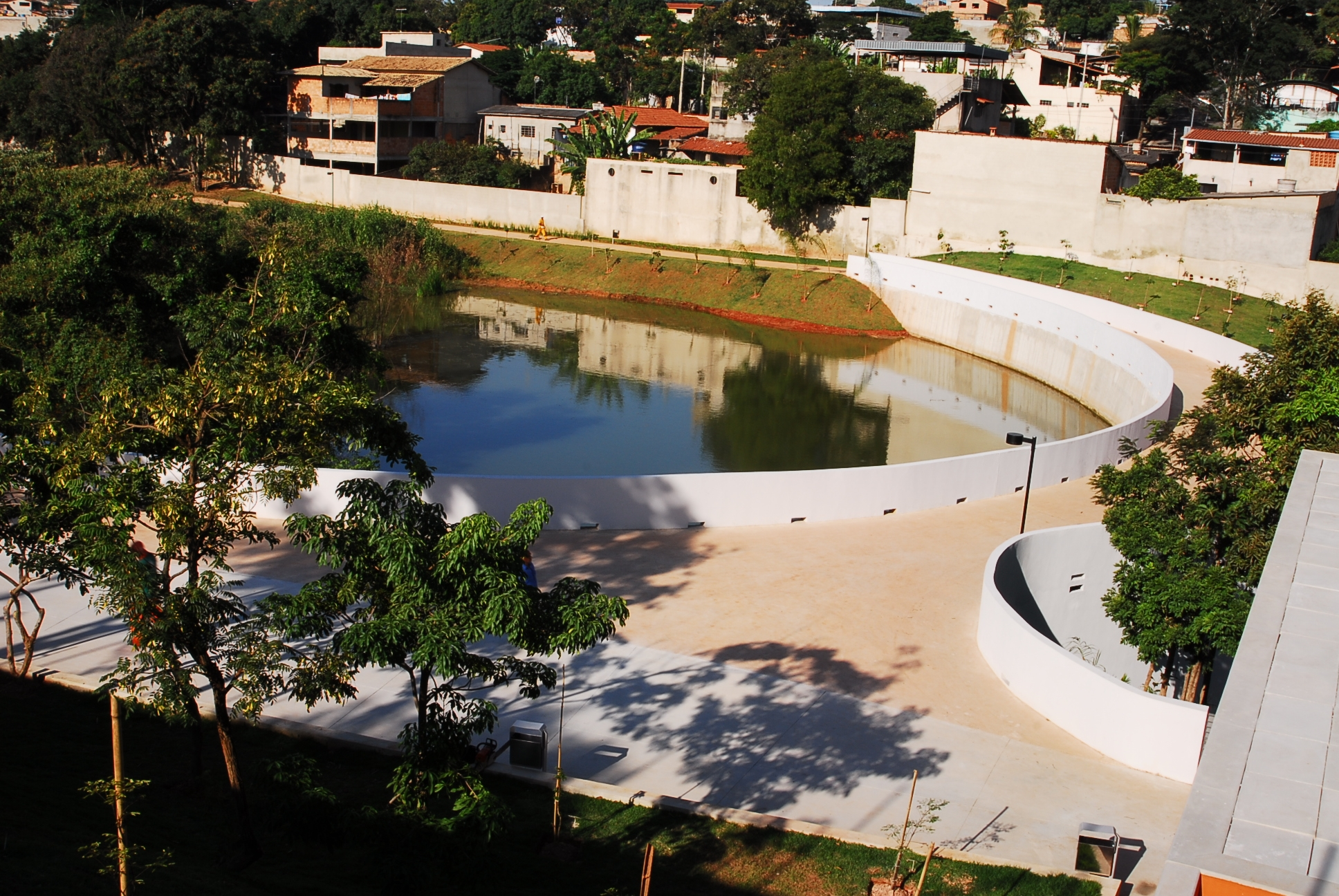 Vista da represa de contenção de enchentes e do lago artificial formado por ela no Parque Primeiro de Maio em Belo Horizonte, Minas Gerais, Brasil.